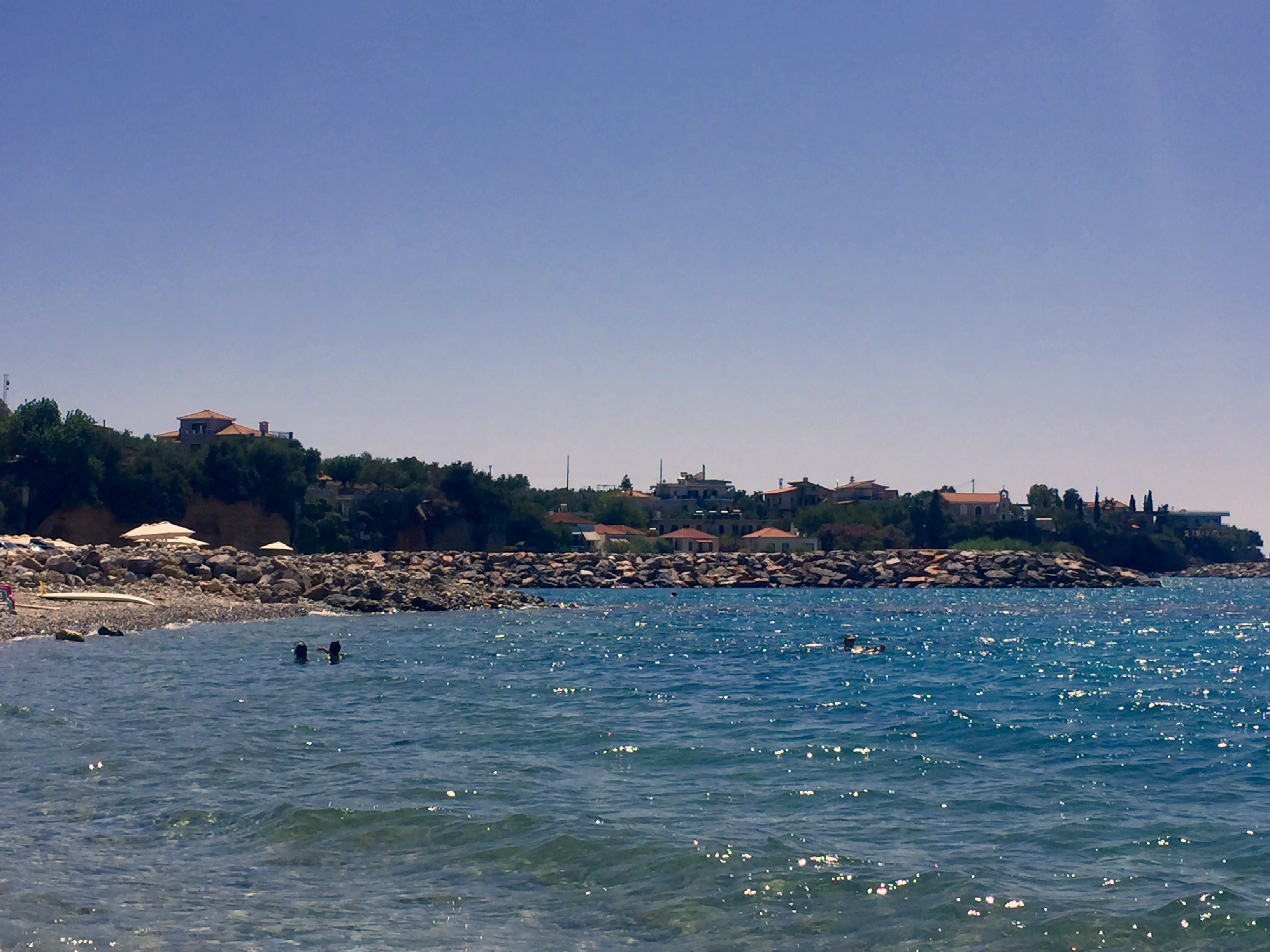 Η Παλιόχωρα της Αβίας στη Δυτική Μάνη (Έξω Μάνη)